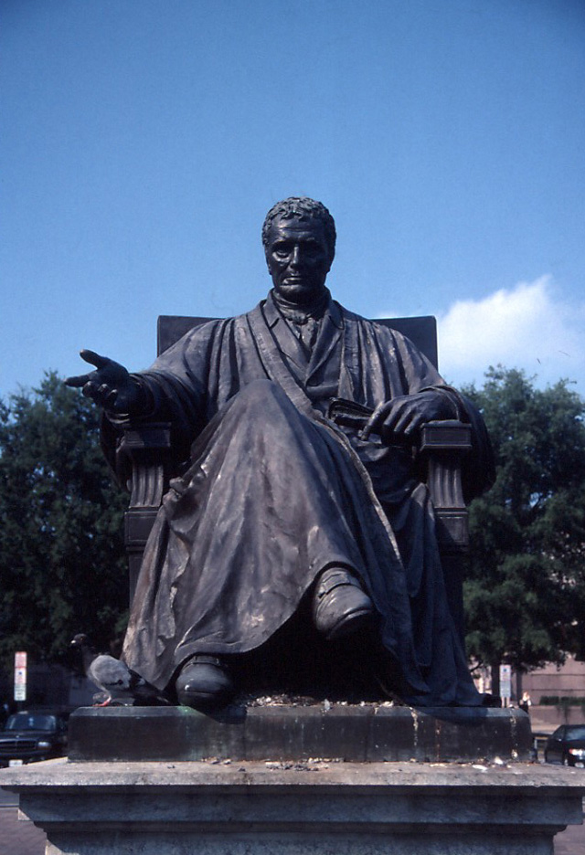 Monument over den amerikanske højestretspræsident John Marshal